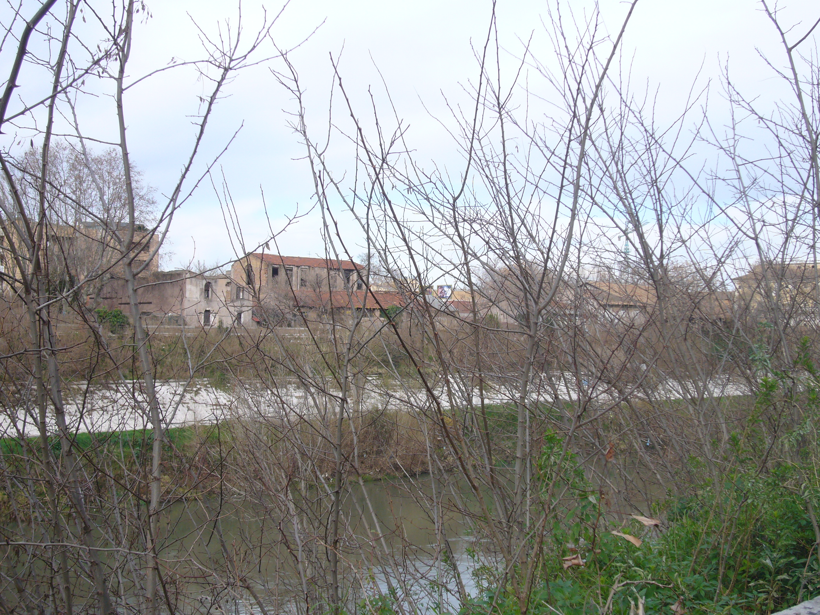 Roma, lungotevere Portuense da Testaccio